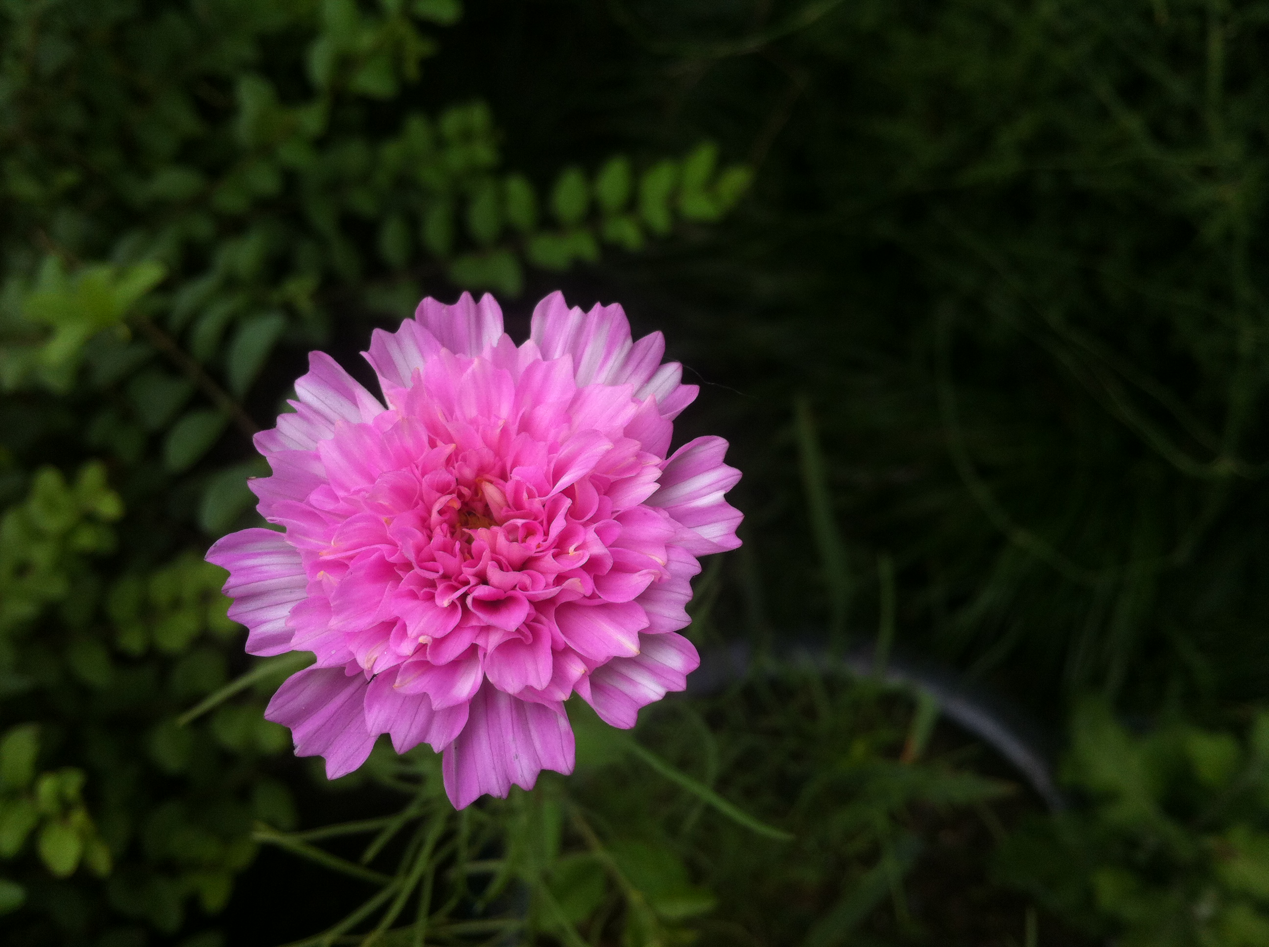 重瓣波斯菊